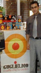 mimgug.jpg